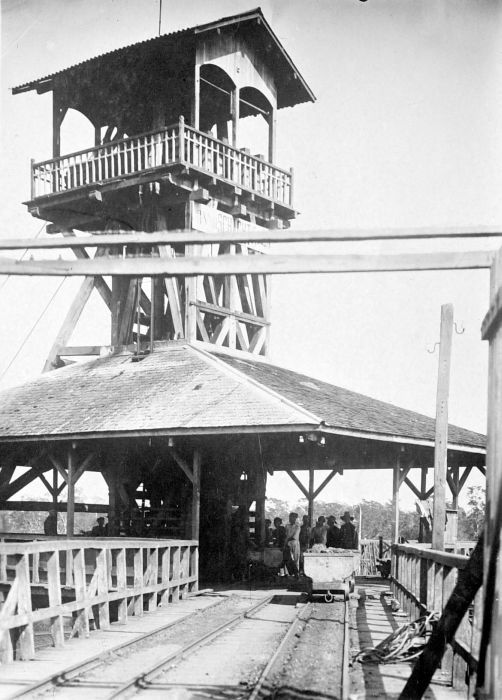 Repronegatief. In 1894 was de eerste kolenmijn op Borneo te Pengaron geopend, een gebeurtenis waar zelfs de Gouverneur-Generaal aan te pas gekomen was. Met deze en andere vroege steenkolenmijnen op Borneo ging het niet erg goed. Daar kwam pas verandering in met de oprichting van de Steenkolen Maatschappij Poeloe Laoet in 1903 die op het eiland met dezelfde naam een mijn opende. De Maatschappij legde in hoog tempo een spoorlijn en een weg aan, bouwde barakken voor de koelies, een ziekenhuis en begon grote aantallen koelies te importeren voor het werk in de mijn. De afzet was verzekerd dankzij de gunstige ligging van het eiland als kolenstation op de zeeroutes. (P. Boomgaard, 2001). Schacht V met losvloer